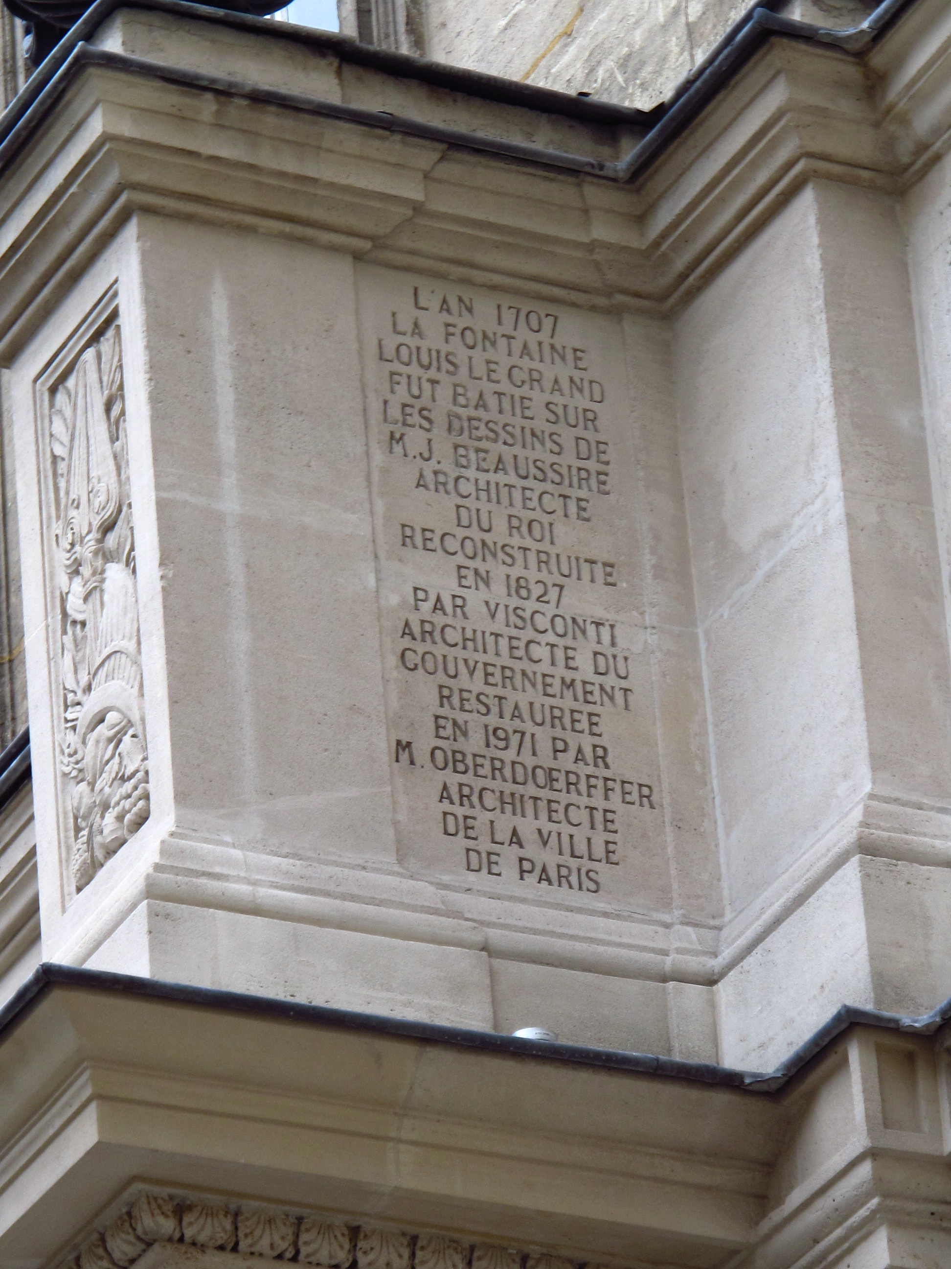 Description de l'historique de la fontaine Gaillon, présente sur le côté droit du fronton de la fontaine : "L'an 1707 la fontaine Louis le Grand fut bâtie sur les dessins de M. J. Beaussire, architecte du roi. Reconstruite en 1827 par Visconti, architecte du gouvernement. Restaurée en 1971 par M. Oberdoerffer, architecte de la ville de Paris".